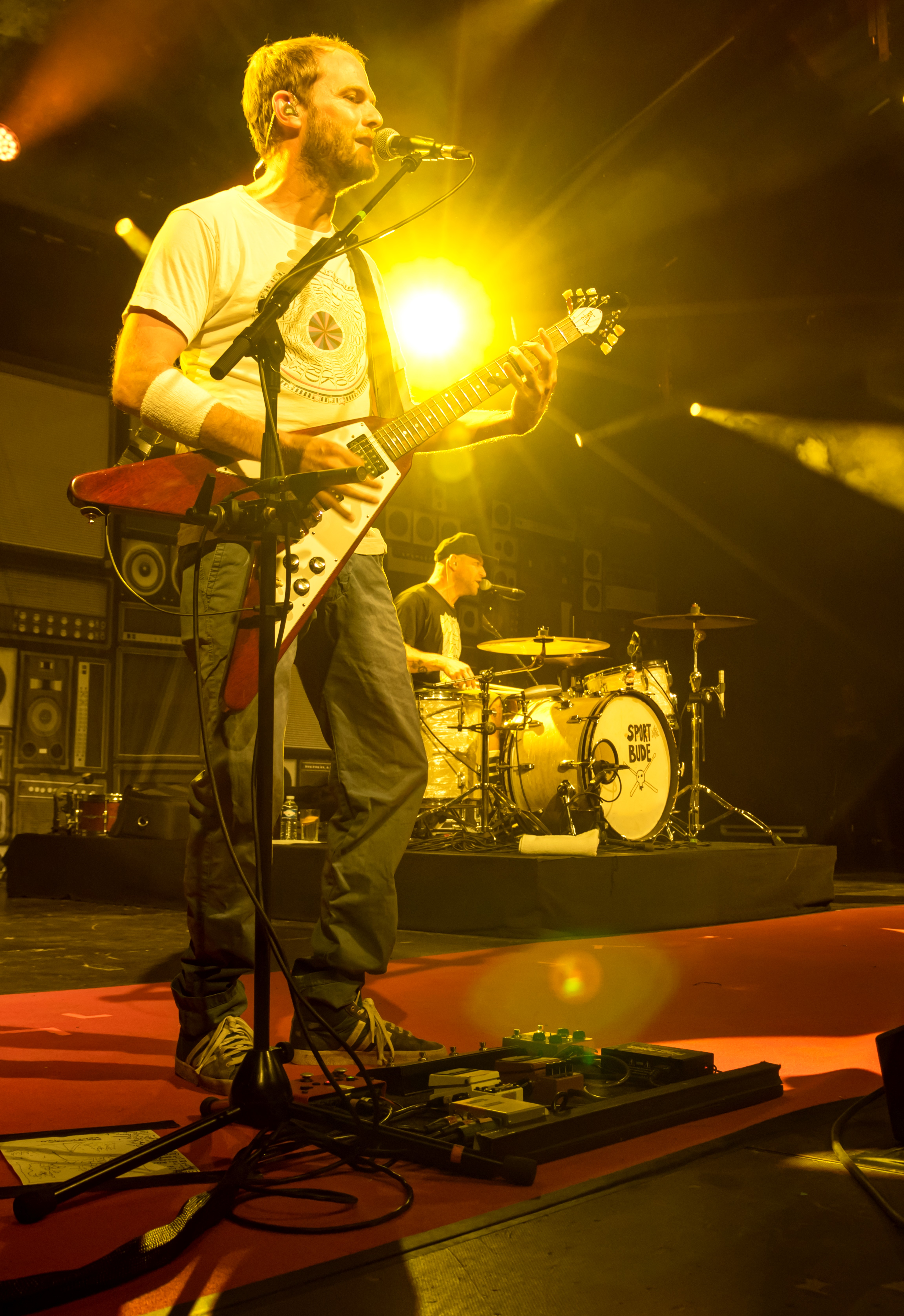 Bilder vom Zelt Musik Festival 2017 in Freiburg im Breisgau Sportfreunde Stiller am 18.07.2017